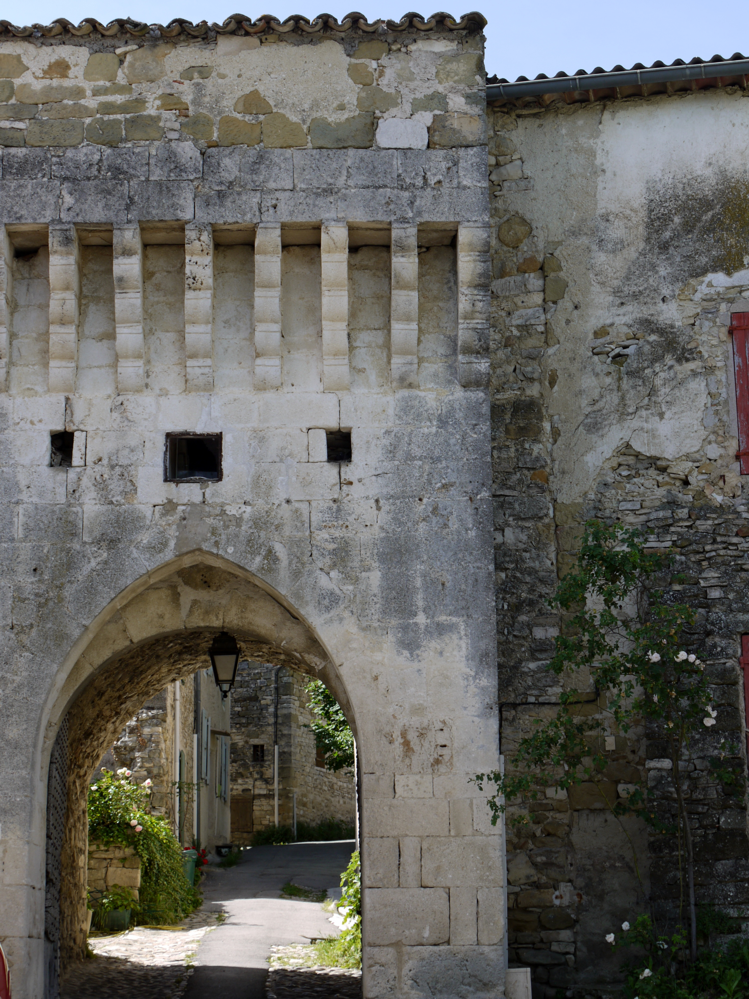 Porte et rempart de Revest des Brousses, Alpes de Haute Provence, France